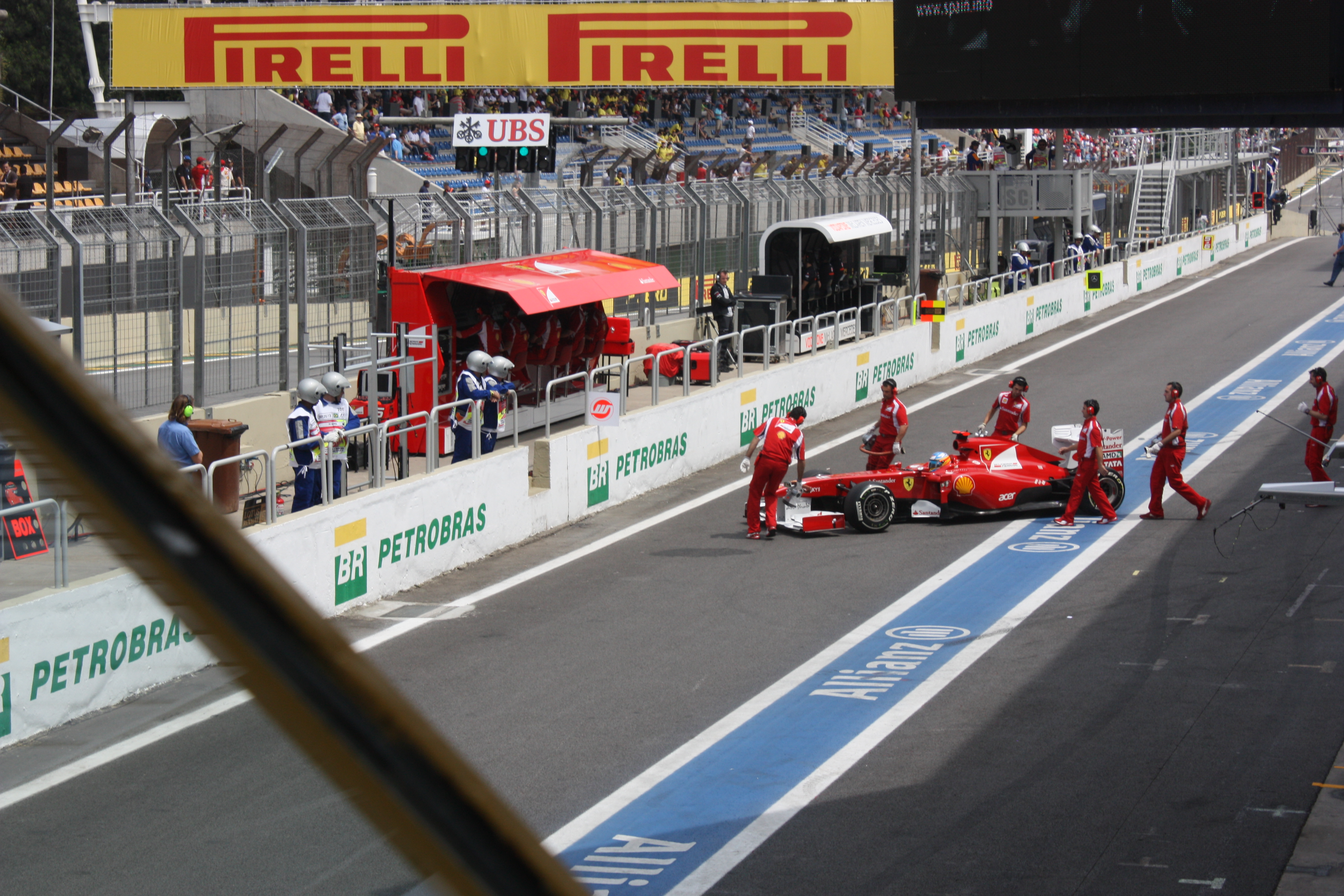 Ferrari voltando ao box, durante o treino de sábado